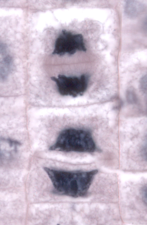 Meristematische Zellen in verschiedenen Mitosestadien: Telophase bei zwei benachbarten Zellen. Zellen aus dem Bereich des Spitzenmeristems der Wurzel der Küchenzwiebel (Allium cepa). Zur Bezeichnung einzelner Elemente den Mauszeiger über das Bild bewegen (Notizfunktion).